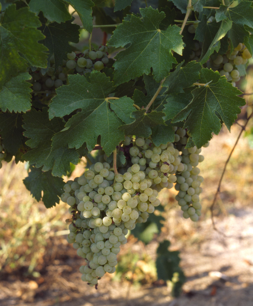 Grape of Len de l'El in Gaillac, France